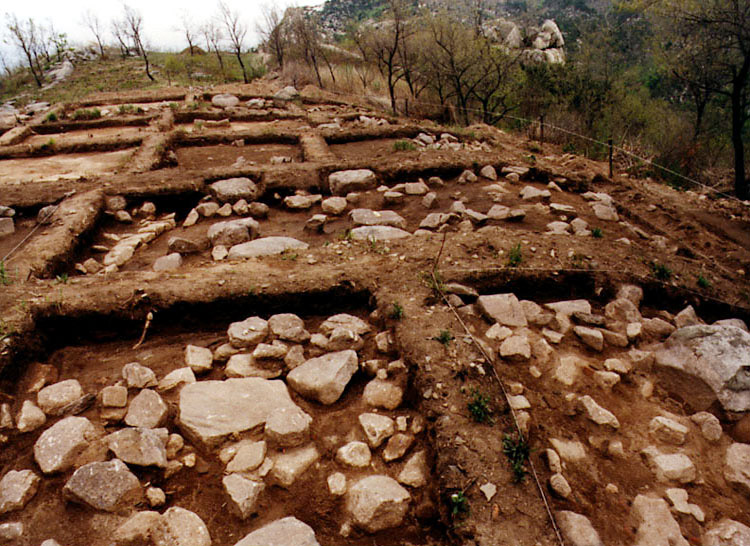 사적 제343호 서울 호암산성 (서울 虎巖山城)